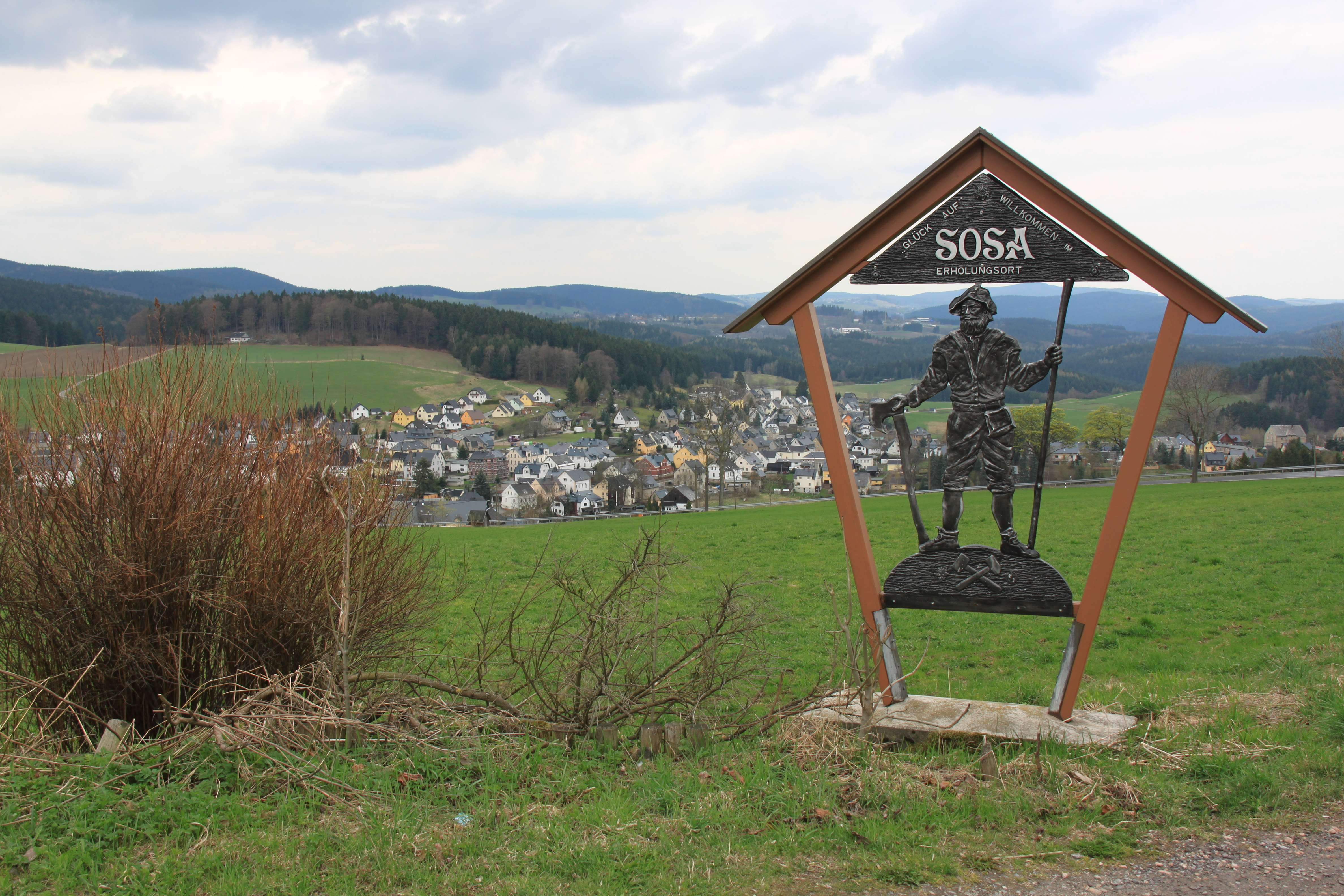 Blick auf den Erholungsort Sosa